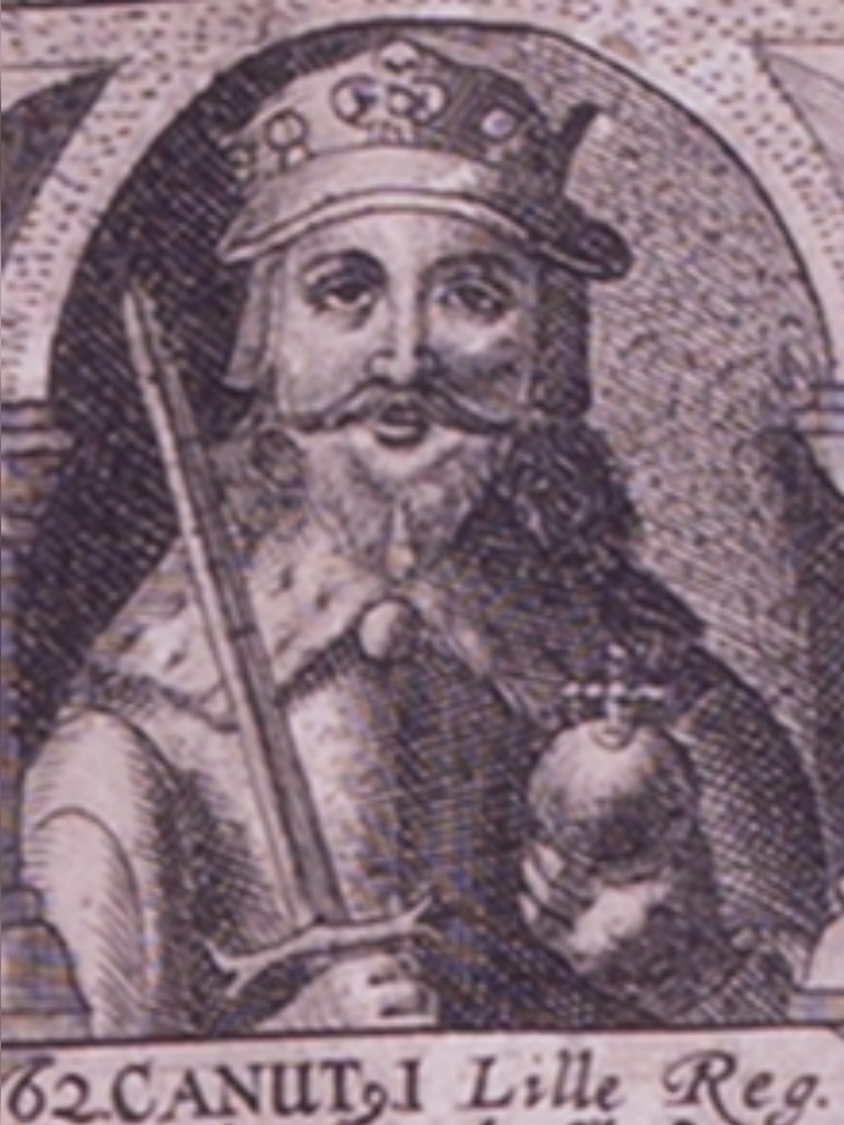 Detalje fra "Veræ effigies regum omnium qvi a primo Dan usqe Christianum IV modo regnantem imperii Danici gloria eminuerunt" publiceret i 1670 af Erico Olai Tormio med billeder og beskrivelser af alle danske monarker fra den mytologiske kong Dan og indtil Christian IV. Det gengivne portræt viser kongen kendt under betegnelserne Knud 1. eller Hardeknud (som anses som far til Gorm den Gamle). Navnet på kunstneren bag portrætterne er ikke oplyst.